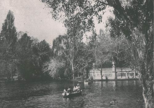 Foto antigua de lago del paseo del Bosque de la ciudad de La Plata.